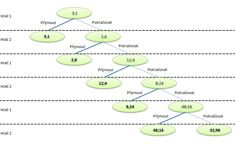 Rozšířená forma hry - postup tvorby stromu hry - fáze 3 Modifikace příkladu z publikace: DLOUHÝ, Martin; FIALA, Petr. Úvod do teorie her. 2.přepracované vydání. Vysoká škola ekonomická v Praze : Nakladatelství Oeconomica, 2009. 120 s. ISBN 978-80-245-1609-7.